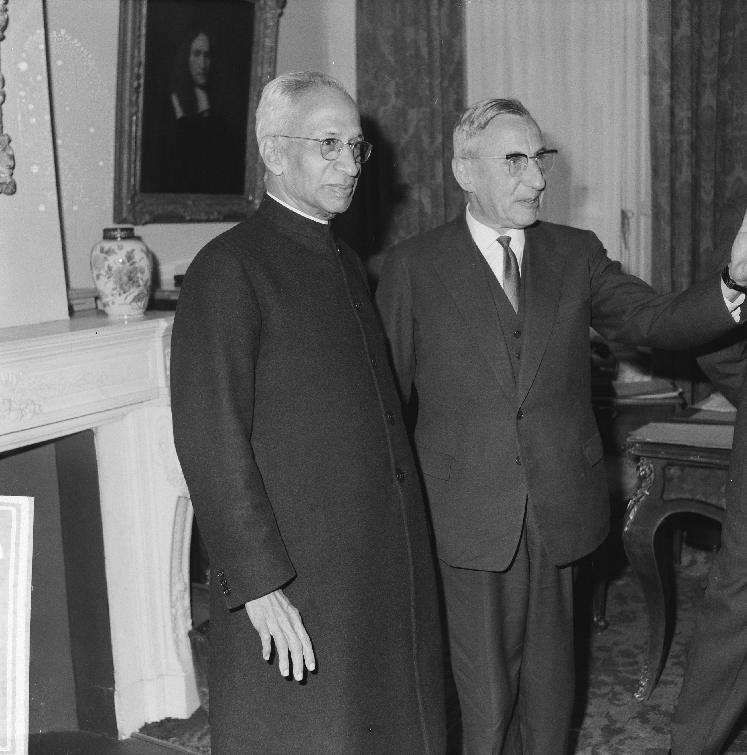 Collectie / Archief : Fotocollectie Anefo Reportage / Serie : [ onbekend ] Beschrijving : Sarvepalli Radhakrishnan bij de Quay . Radhakrishnan en de Quay Datum : 18 oktober 1961 Fotograaf : Pot, Harry / Anefo Auteursrechthebbende : Nationaal Archief Materiaalsoort : Negatief (zwart/wit) Nummer archiefinventaris : bekijk toegang 2.24.01.03 Bestanddeelnummer : 913-0619